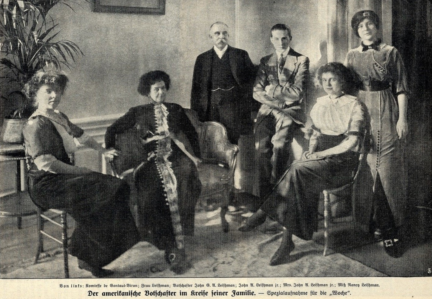 US-Botschafter Leishman mit seiner Familie in Berlin, c. 1912